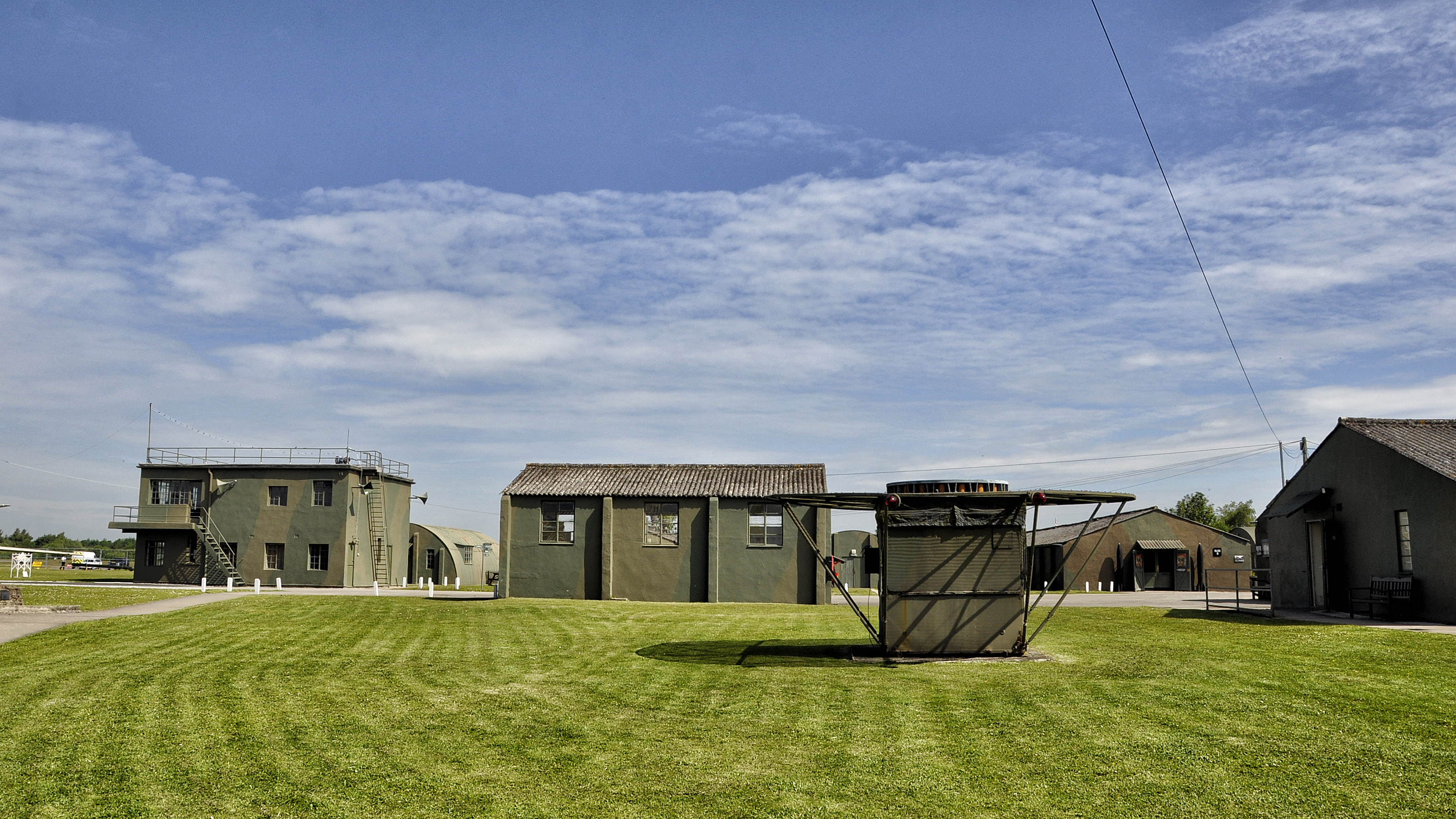 Yorkshire Air Museum met links de oorspronkelijke controletoren en gebouwen uit de 2e wereldoorlog